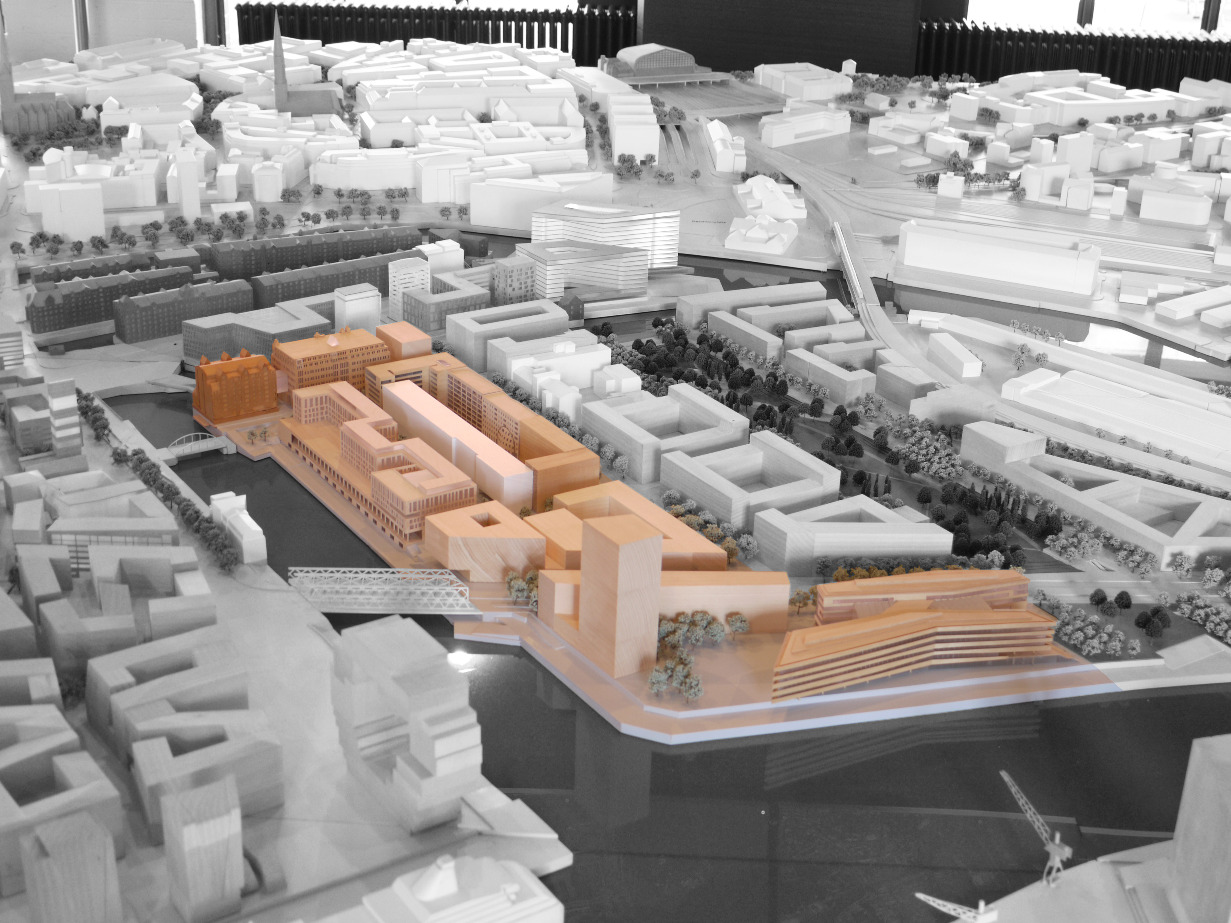 Modell des Teilquartiers Elbtorquartier in der HafenCity in Hamburg, Blickrichtung Norden.